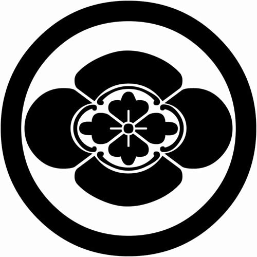 丸に木瓜紋